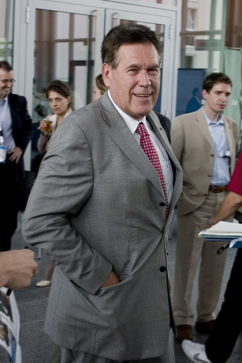 Michael Glos, CSU Landesgruppenchef